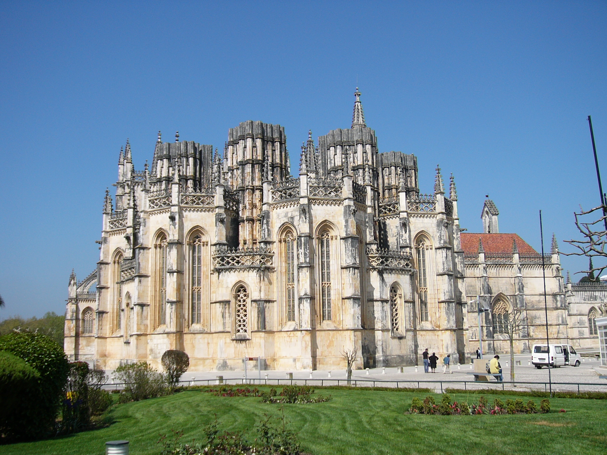 Monasterio dominico de Santa María da Vitória, Batalha, Portugal. Foto de Manuel González Olaechea y Franco ©